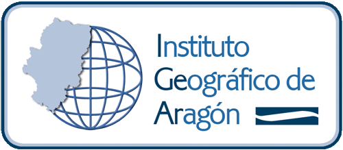 Logotipo del Instituto Geográfico de Aragón